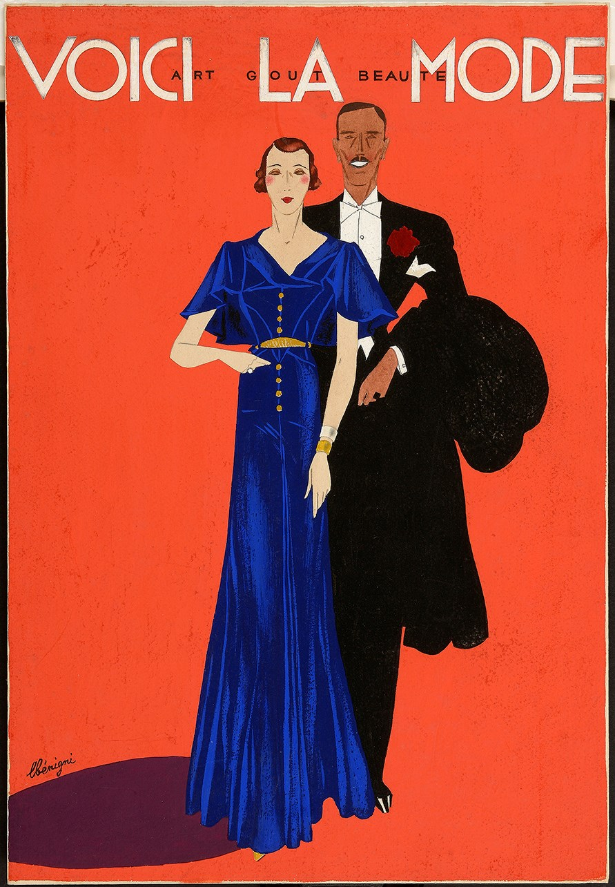 Gouache und schwarze Tinte, links unten signiert und datiert „lbénigni“ Rückseitig beschriftet „chanel and Brun Rouge“ Bildmaße 326 x 225 mm